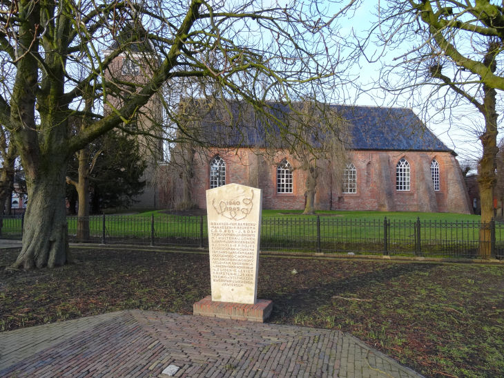 Oorlogsmonument (1959) in Uithuizen, gemaakt door Thees Meesters.